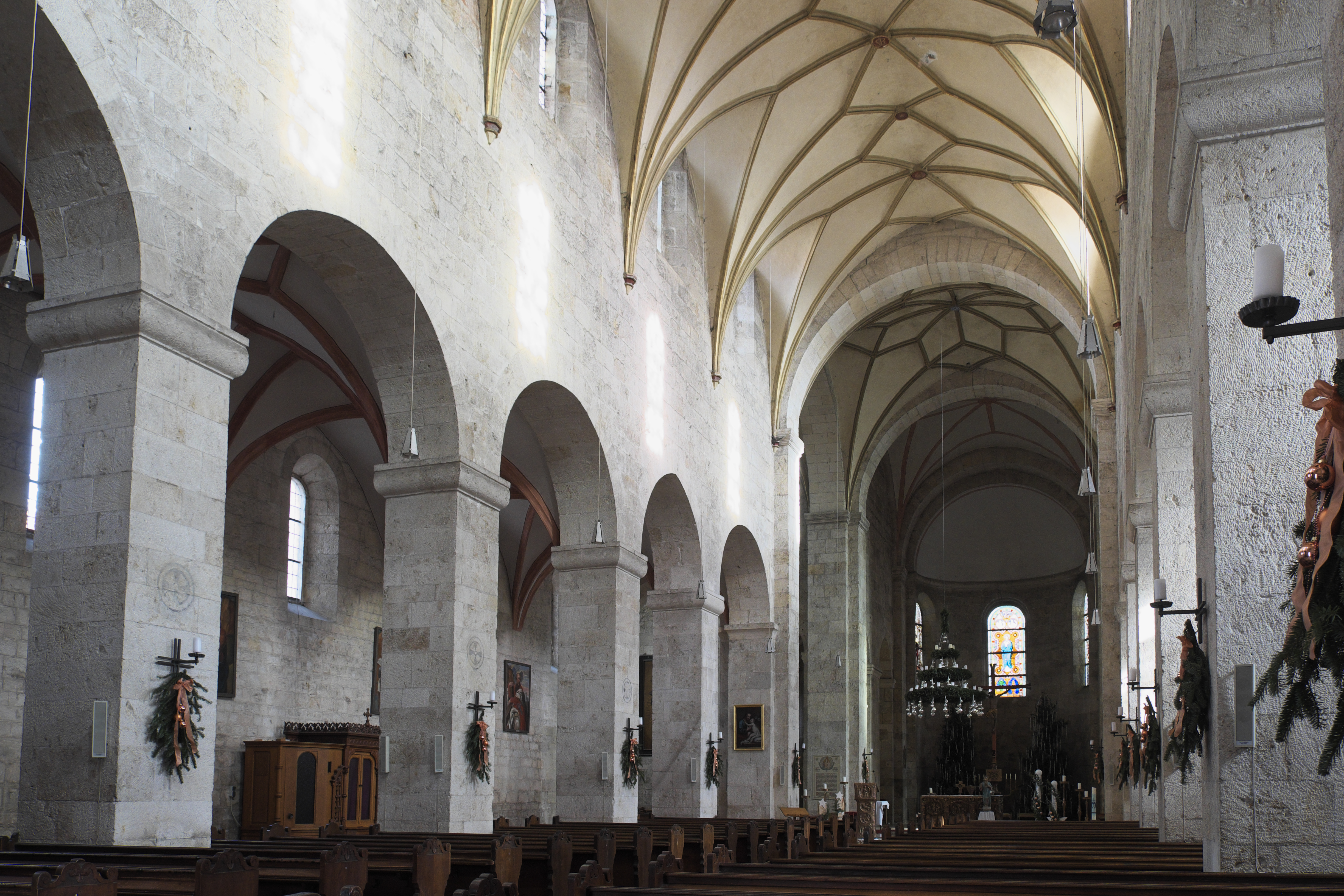 Katholische Pfarrkirche Maria Immaculata in Biburg im niederbayerischen Landkreis Kelheim (Bayern/Deutschland), Innenraum